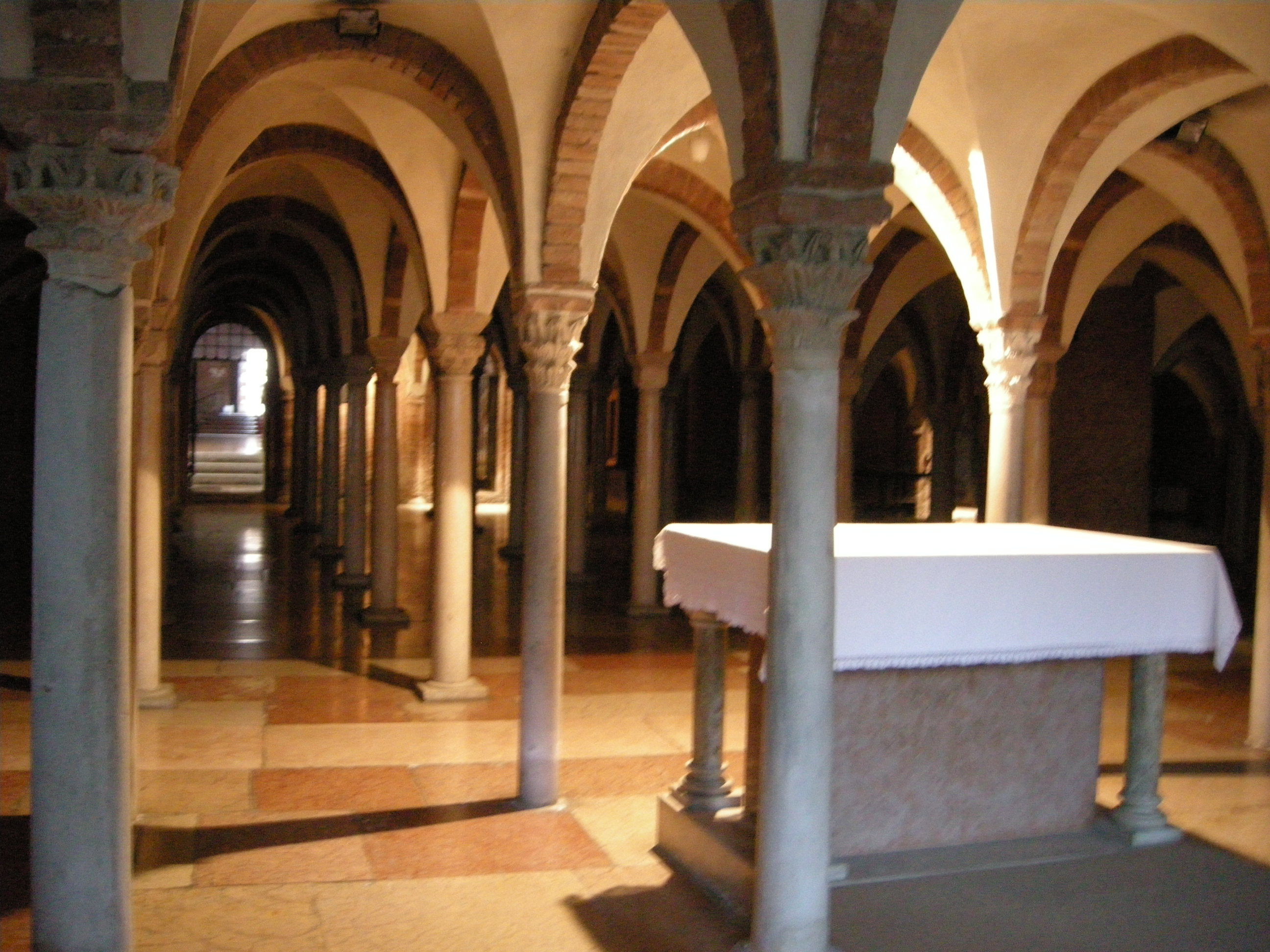 Abbazia di nonantola, interno, cripta